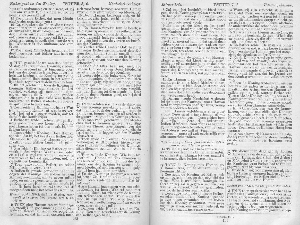 Het boek Esther, hoofdstukken 5, 6 & 7